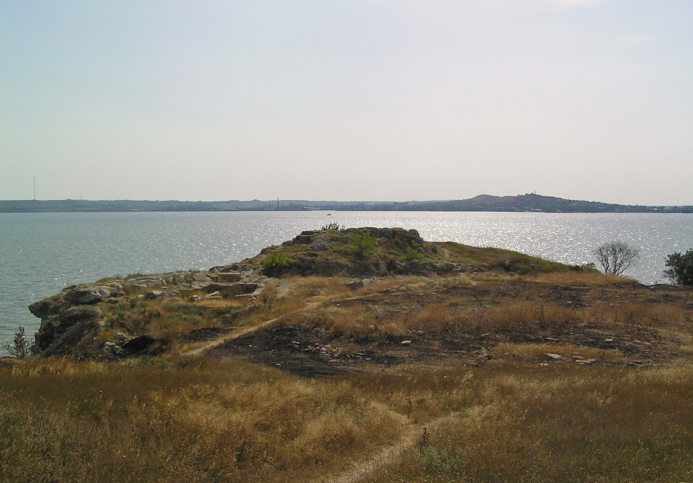 Археологічний комплекс «Стародавнє місто Мірмекій» VI ст. до н. е. — III ст. н.е., між вул. Войкова та вул. Московською, 52-а, м.Керч, АР Крим